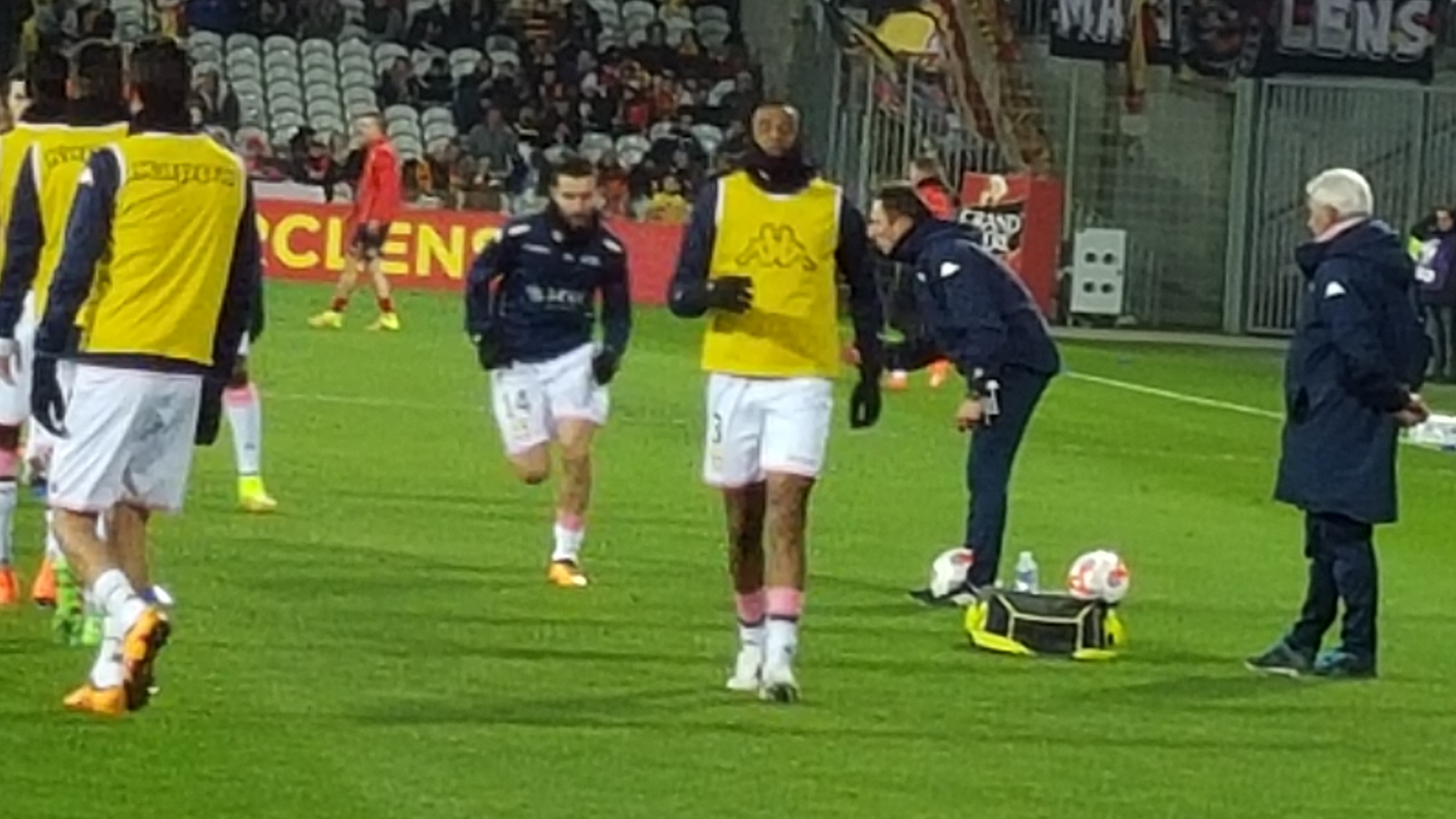 Betao (en jaune) avant le match RC Lens / Evian TG, comptant pour la vingt-huitième journée du Championnat de France de football de Ligue 2, le 29 février 2016, au Stade Bollaert Delelis